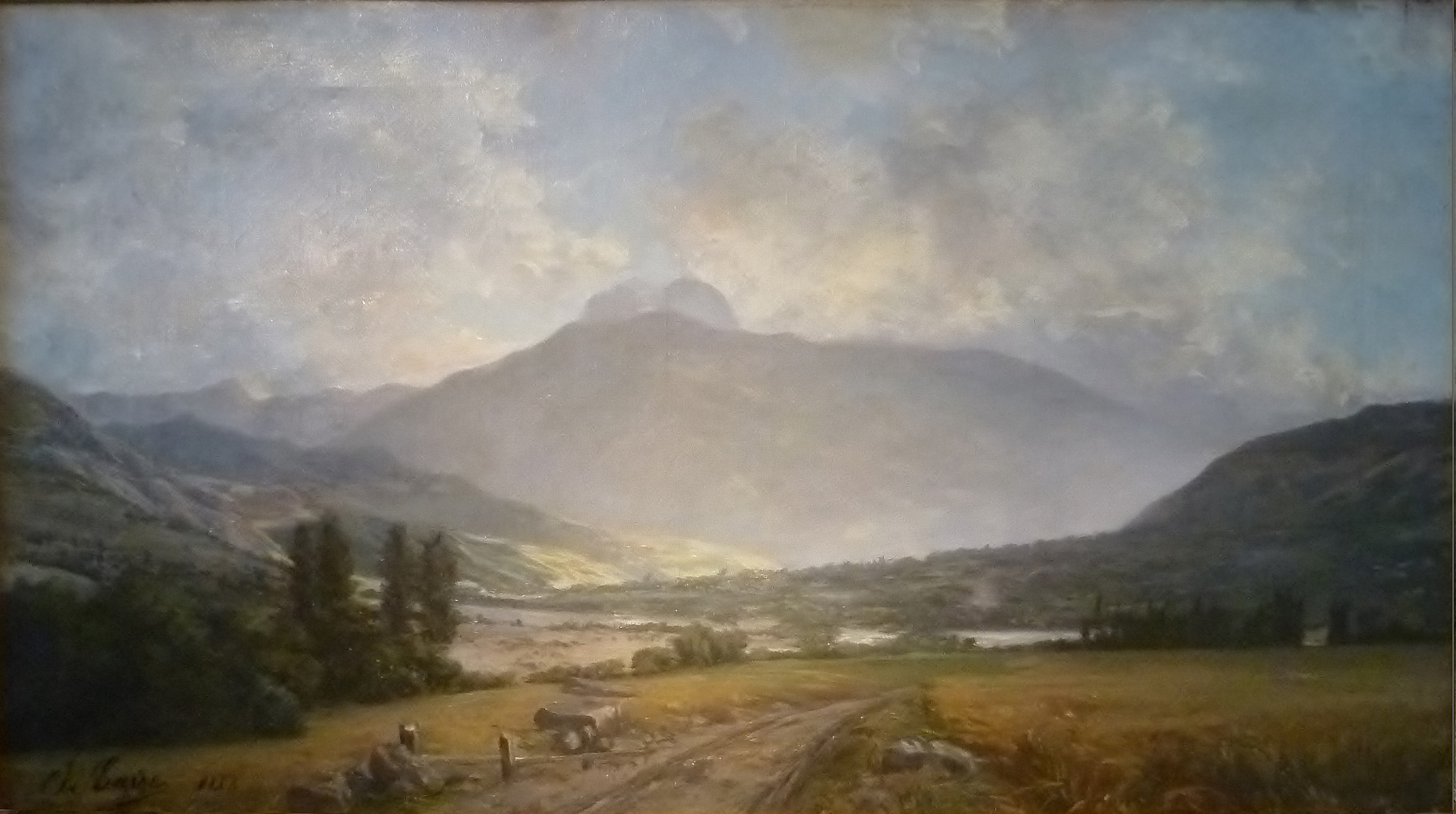 "A Barcelonnette" (1888) par Jean Caire; huile sur toile 95 x 53 cm; Musée Gassendi, Digne-les-Bains, France